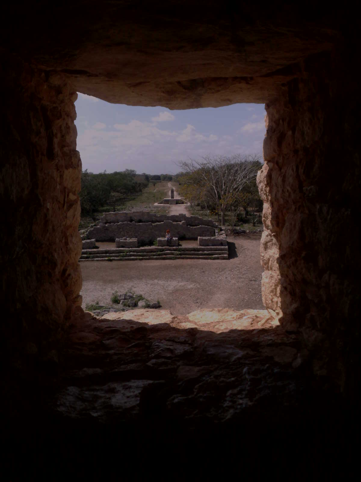 El Sacbé (camino) de Dzibichaltún, visto desde el interior de la pirámide